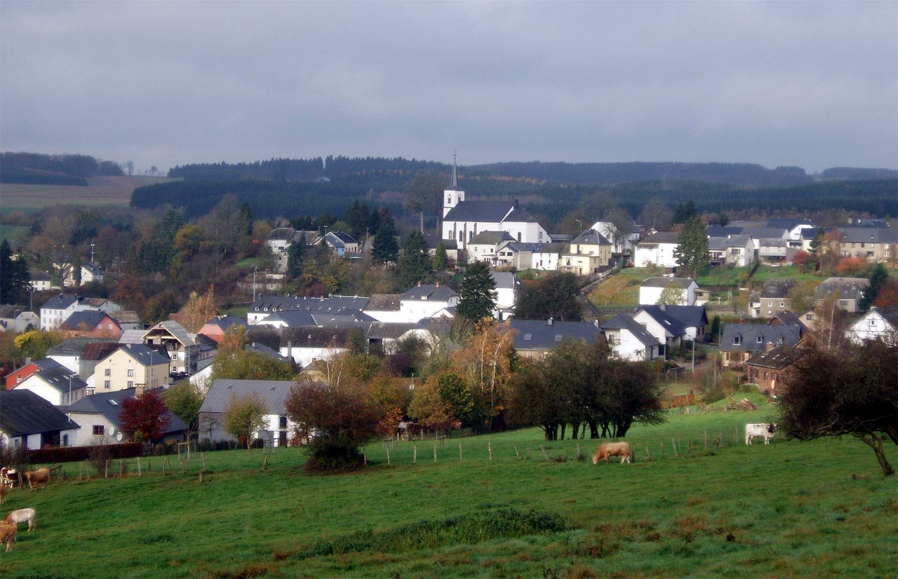 Le village luxembourgeois de Weiswampach